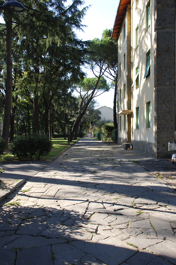 Isolotto (quarter), Florence, Italy. Viale dei Bambini: Boulevard.